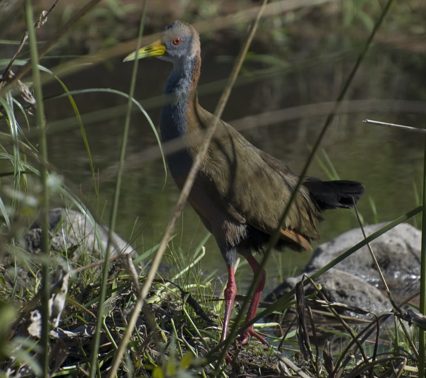 GALLINETA_GRANDE_Aramides_ypecaha